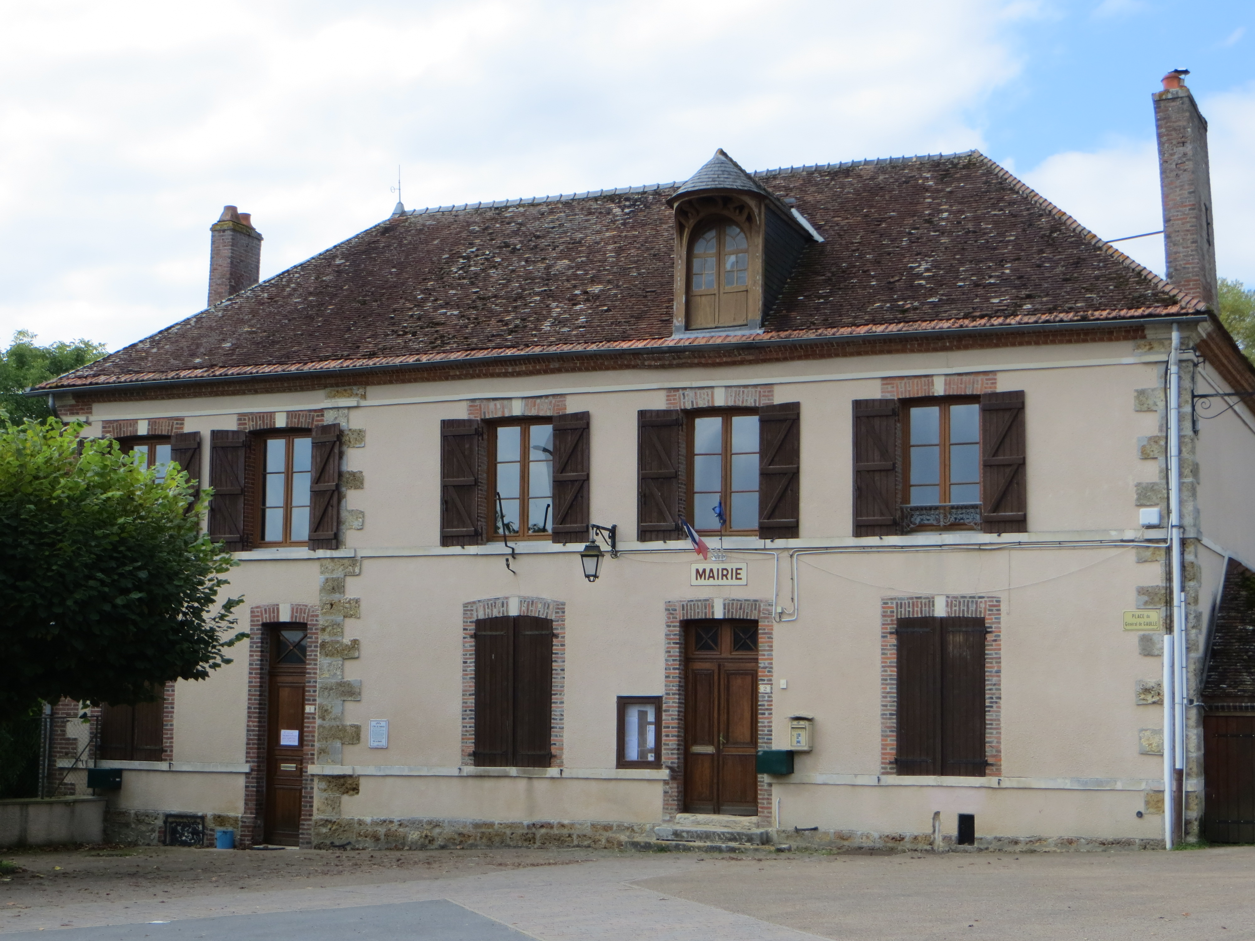 Mairie